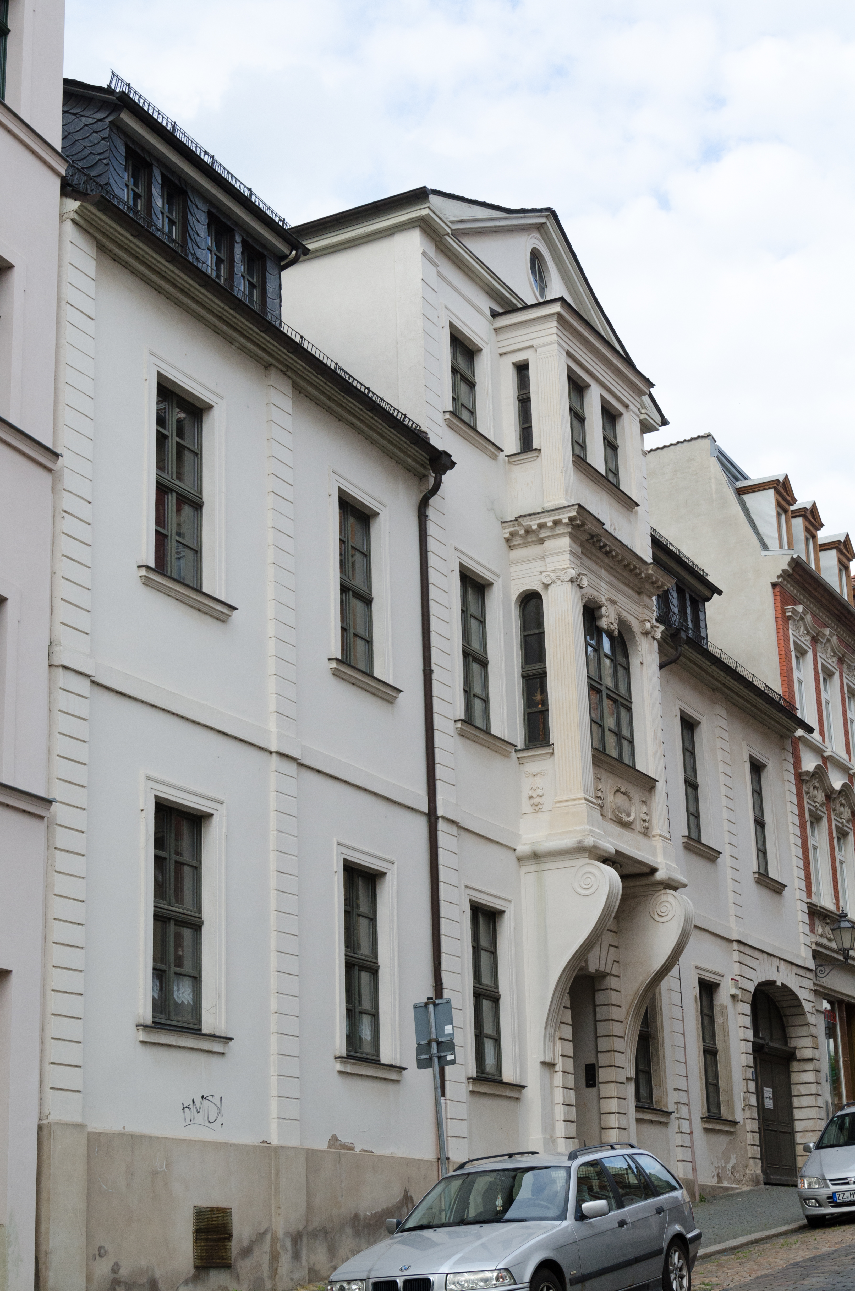 Zeitz, Messerschmiedestraße 9